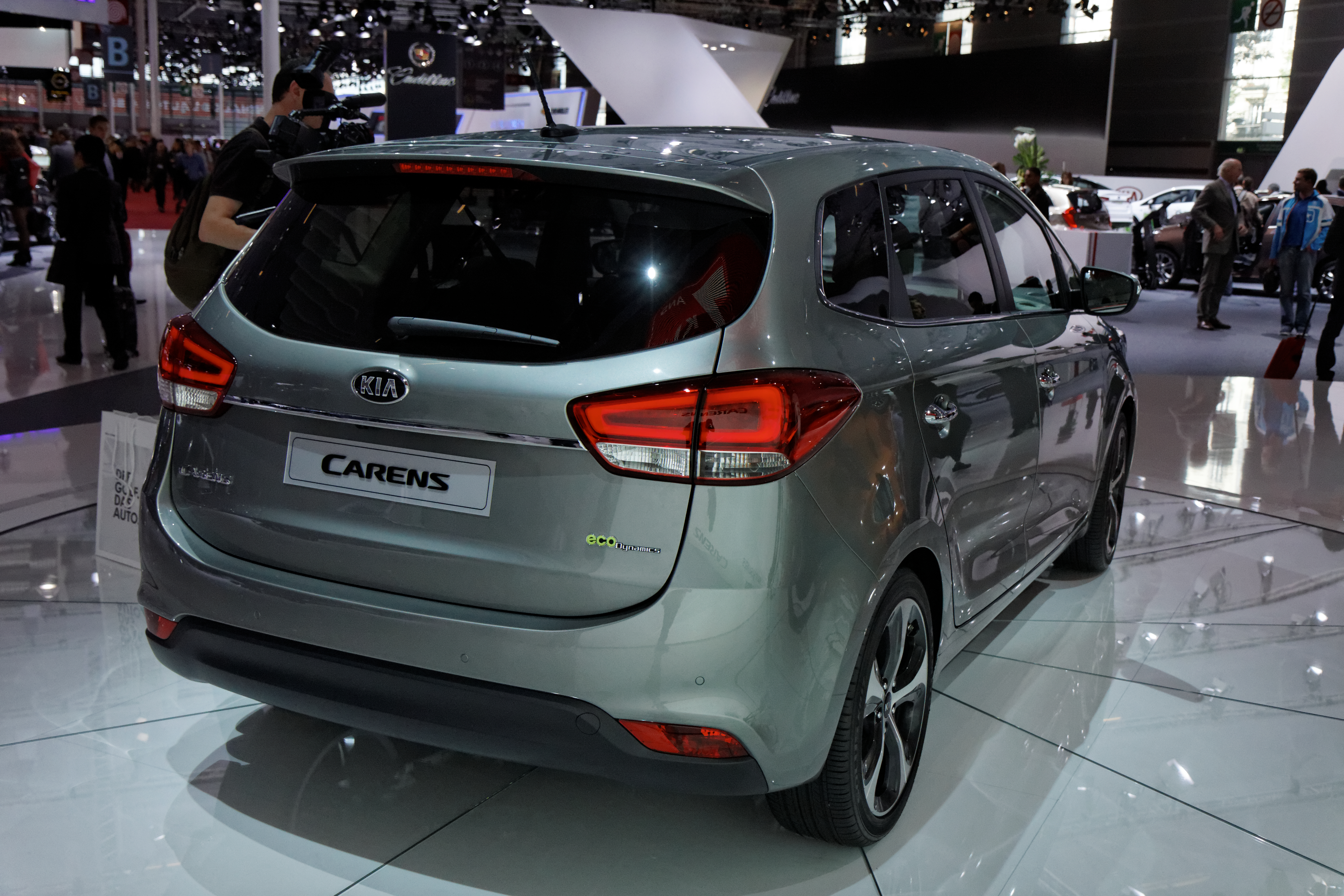 Une Kia Carens présentée lors du Mondial de l'Automobile de Paris 2012.